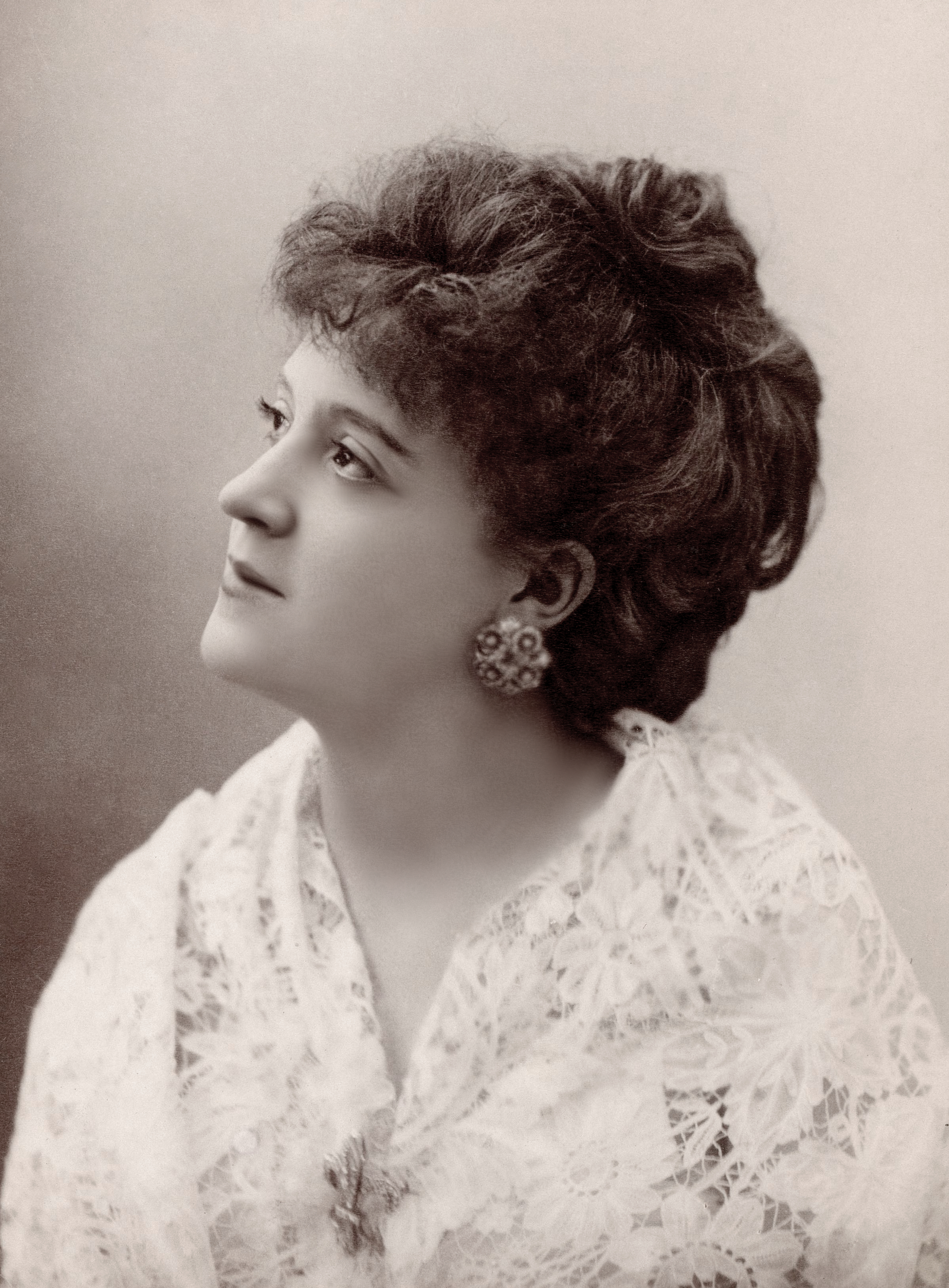 Ellen Andrée (1856 - 1933), actrice française de théâtre.